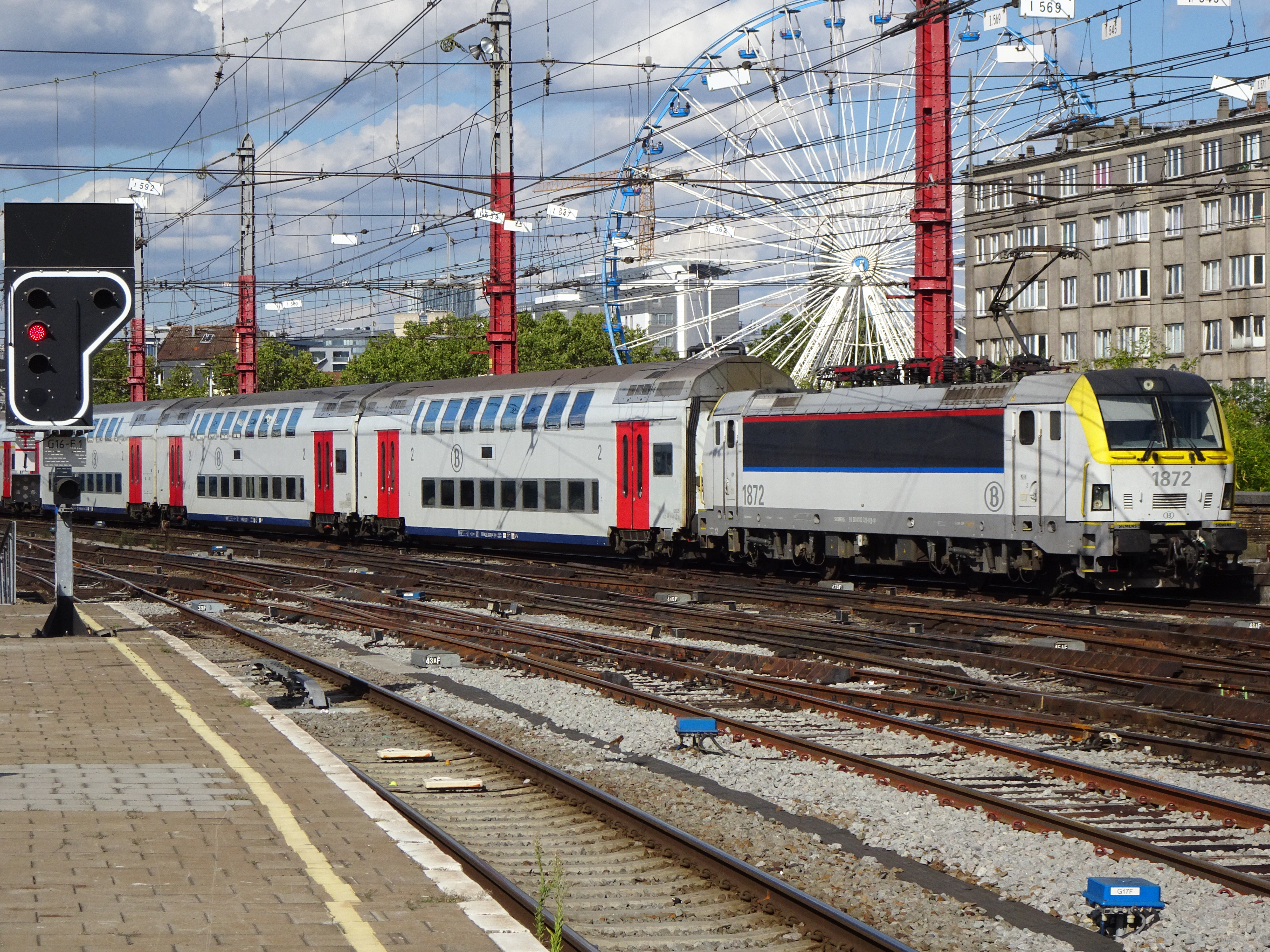 La 1872 remorque le train IC4538 (Essen - Charleroi-Sud) qui va bientôt s'arrêter à Bruxelles-Midi voie 21